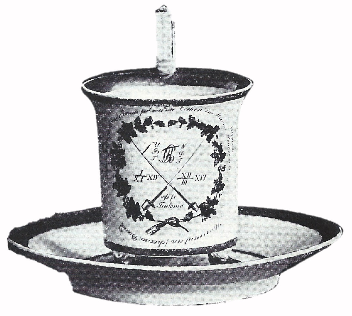 Tasse der urburschenschaftlichen Teutonia von 1814